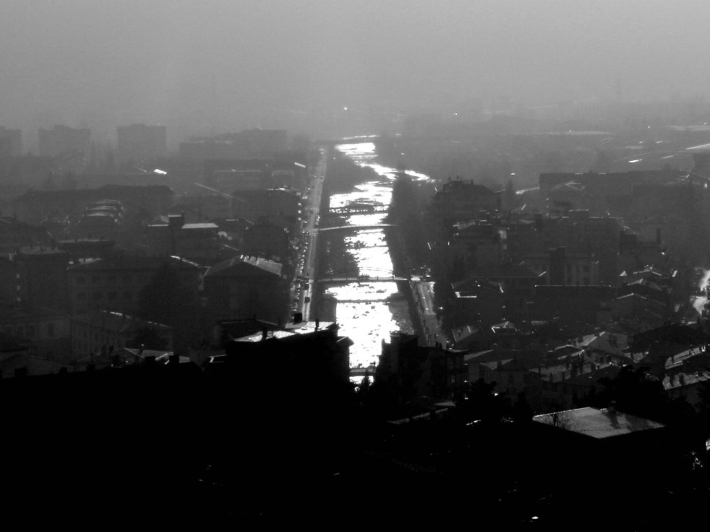 Torrente Mallero al tramonto (Sondrio) in bianconero